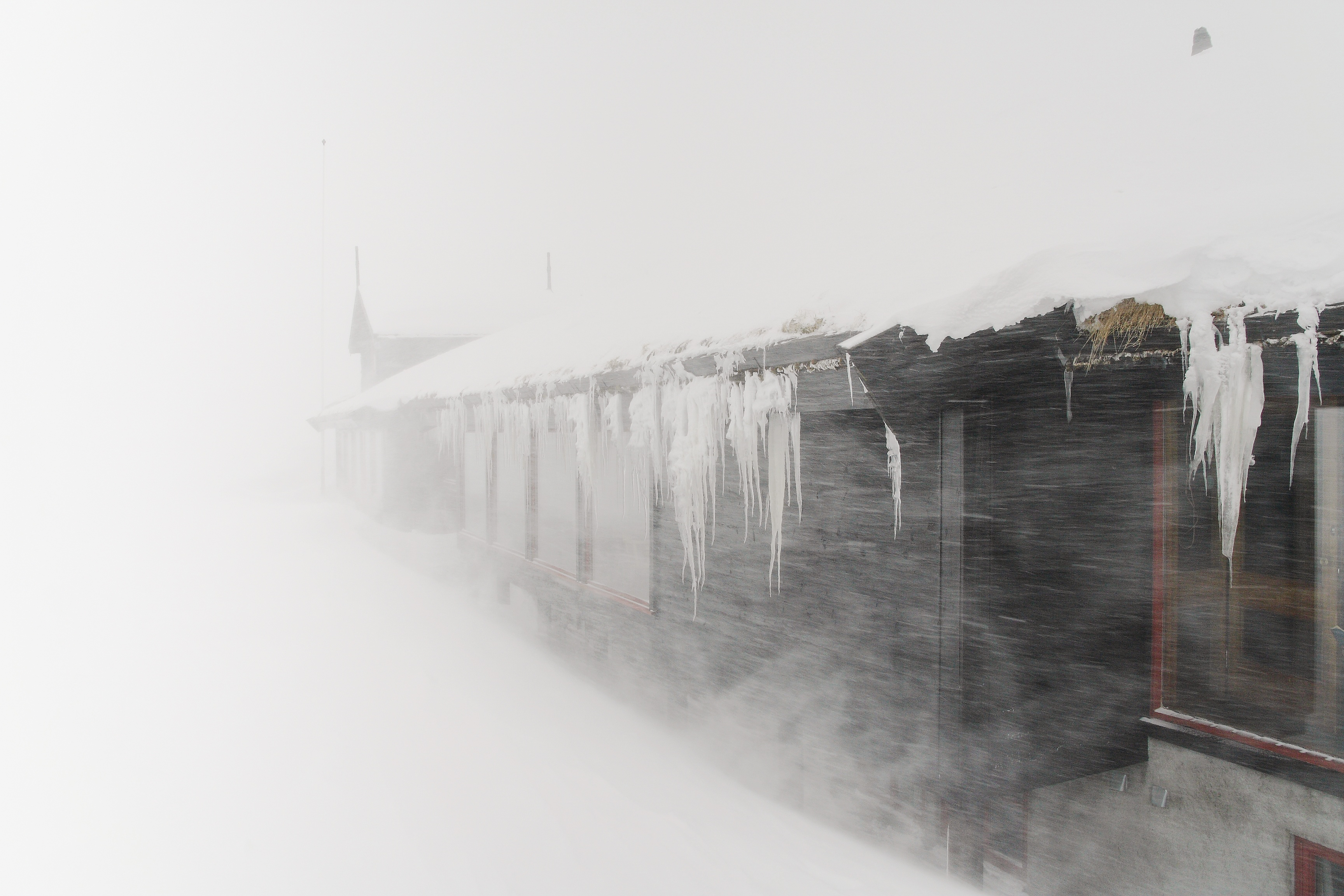 Winter snow storm ( [pol.] zawieja) in Hardanger area, Norway.